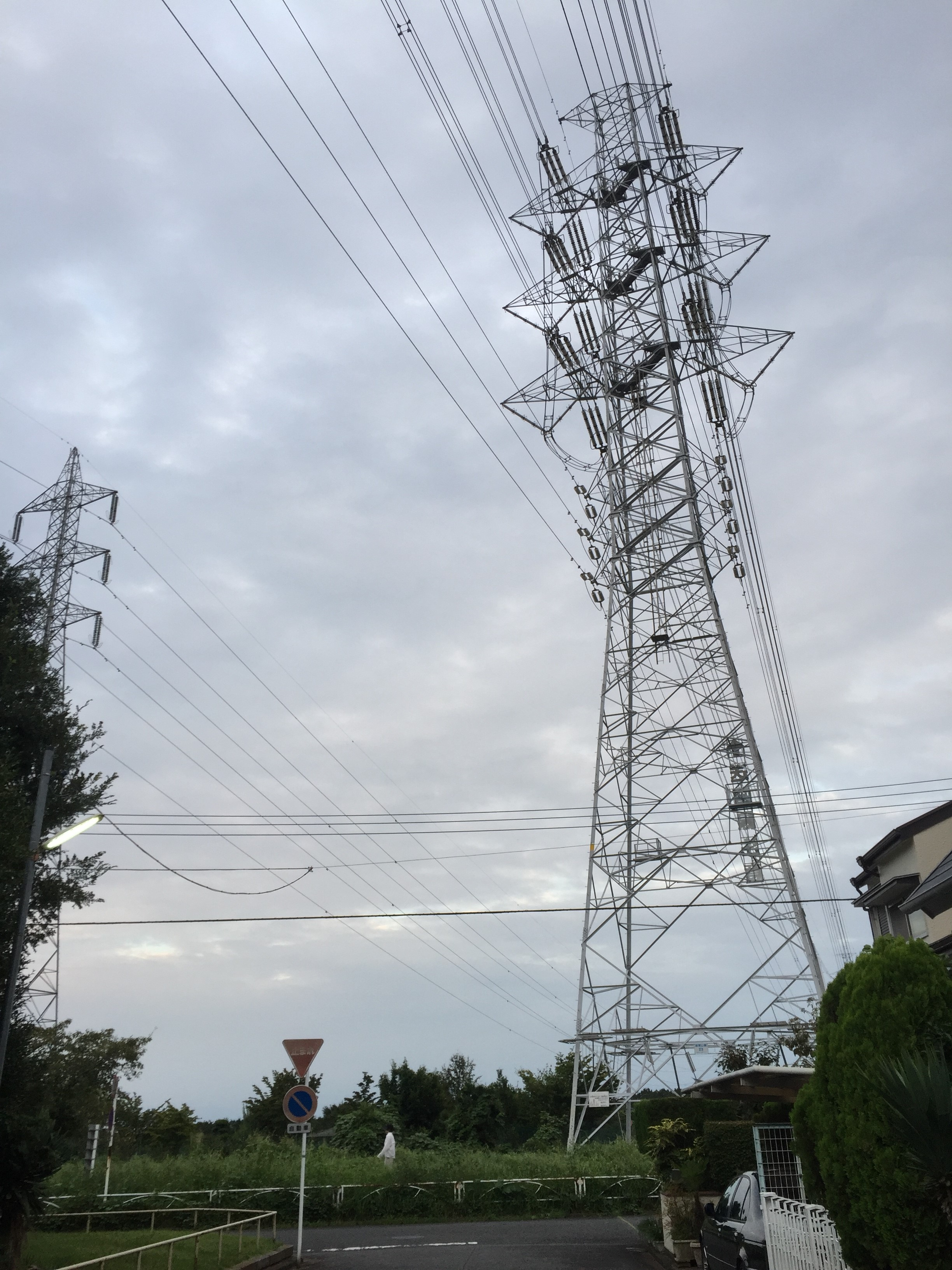 T-33A入間川墜落事故で事故機が切断した南狭山線（右側）。鉄塔の手前には閑静な住宅街が広がる